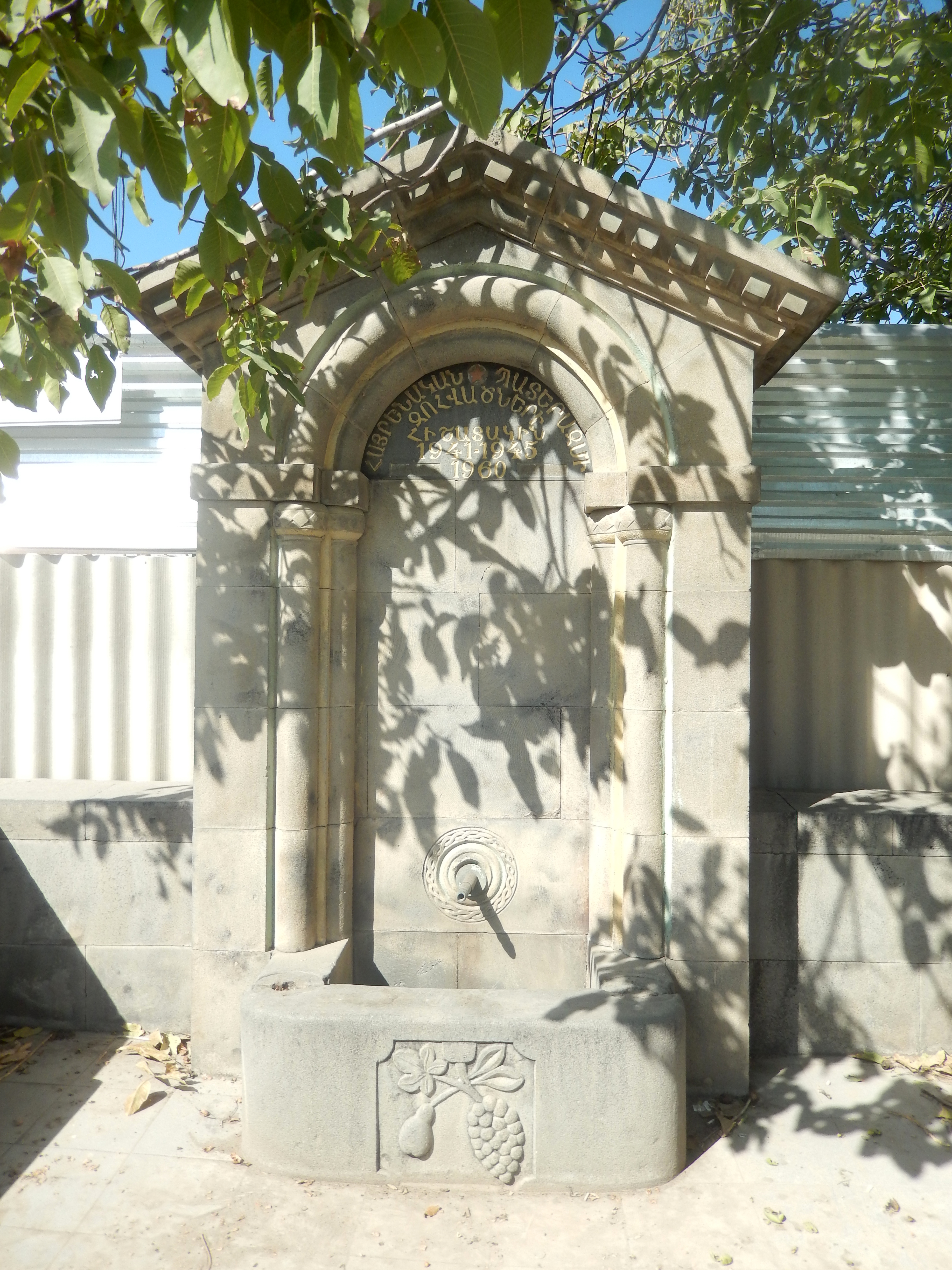 Հուշաղբյուր` Երկրորդ աշխարհամարտում զոհվածներին, Մրգավան 61/4